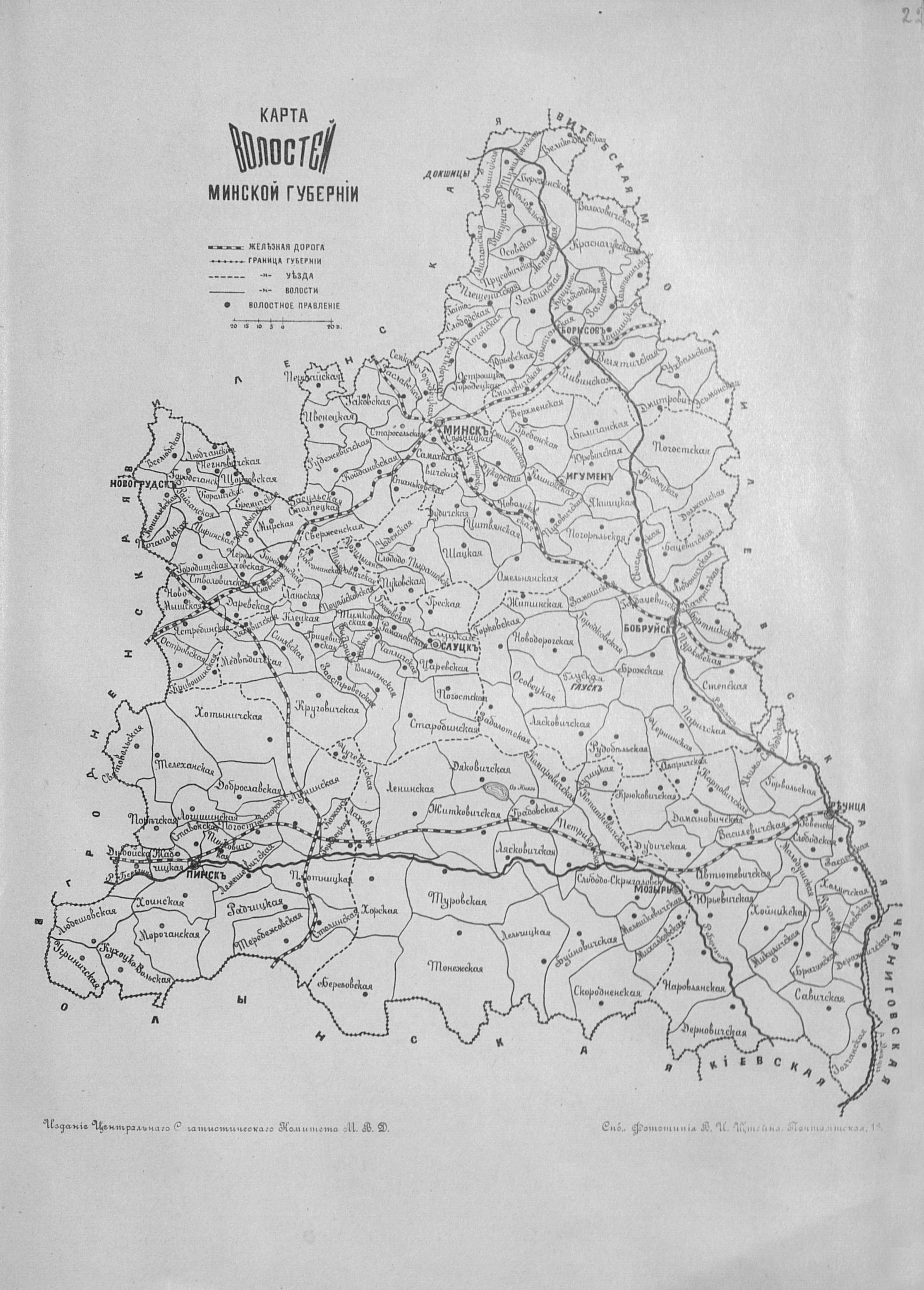 Карта волостей Минской губернии